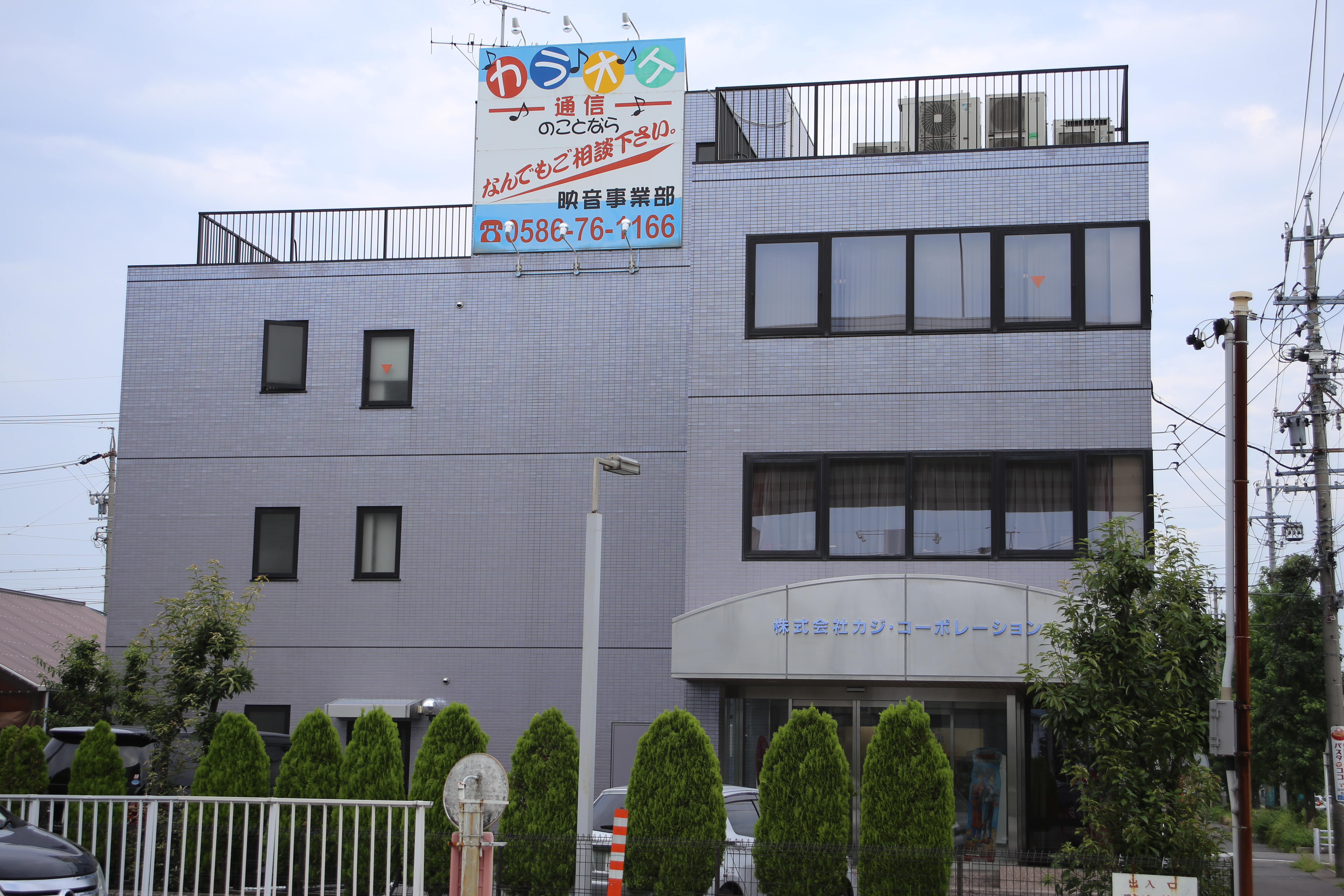 愛知県一宮市のカジコーポレーション本店